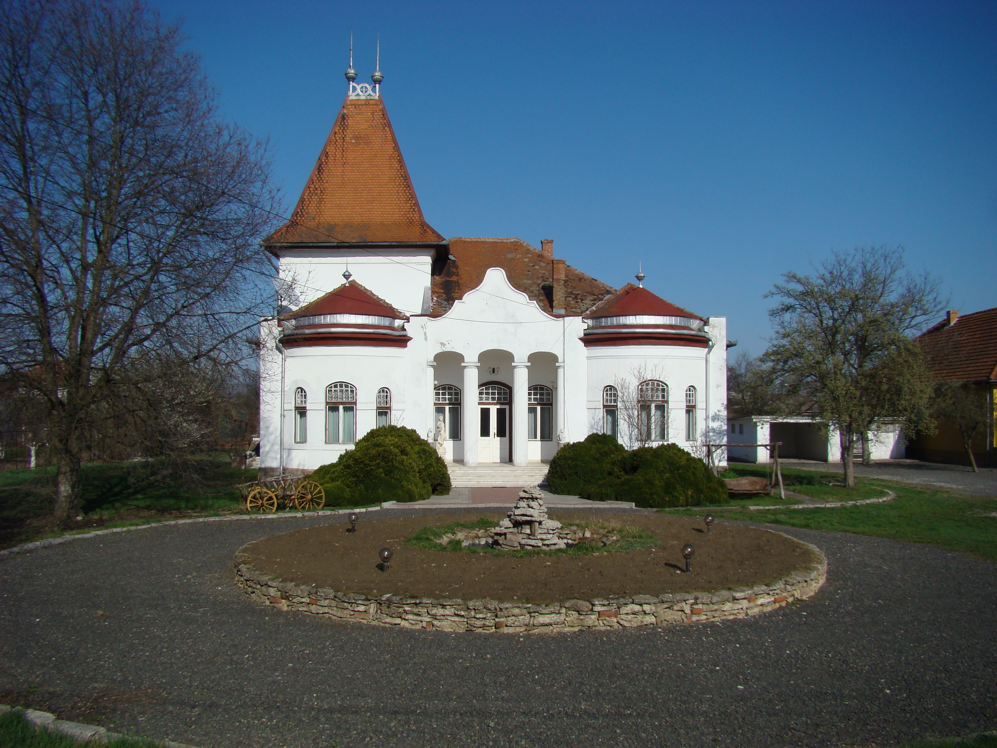 Ilia, județul Hunedoara